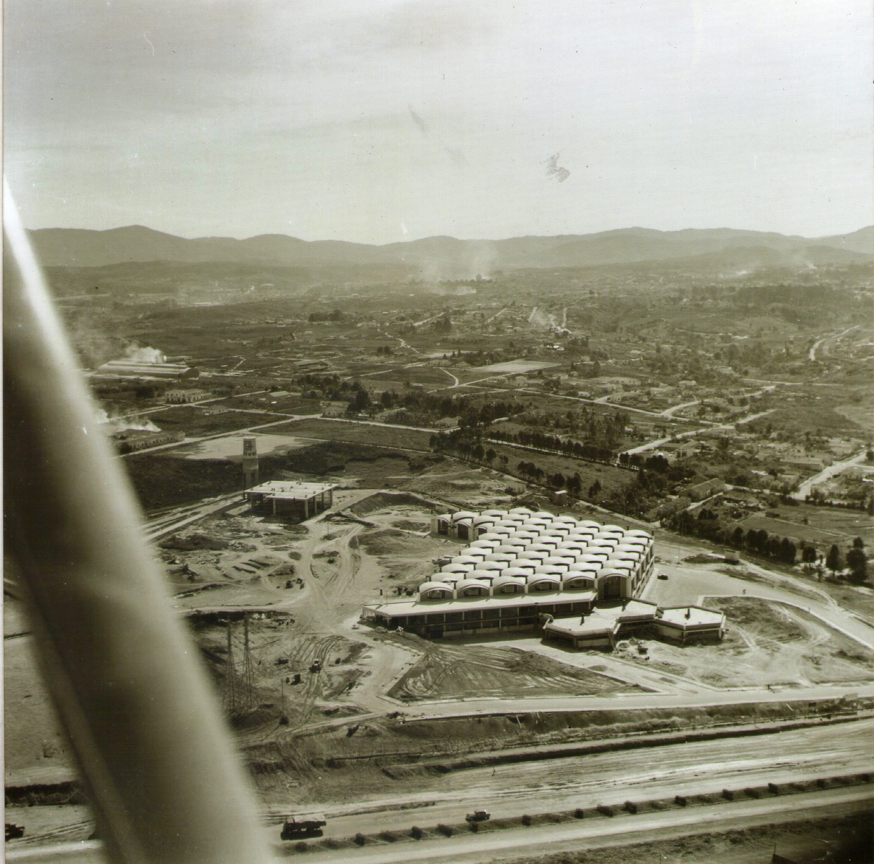 Fábrica da Olivetti em Construção - atualmente Shopping Internacional de Guarulhos